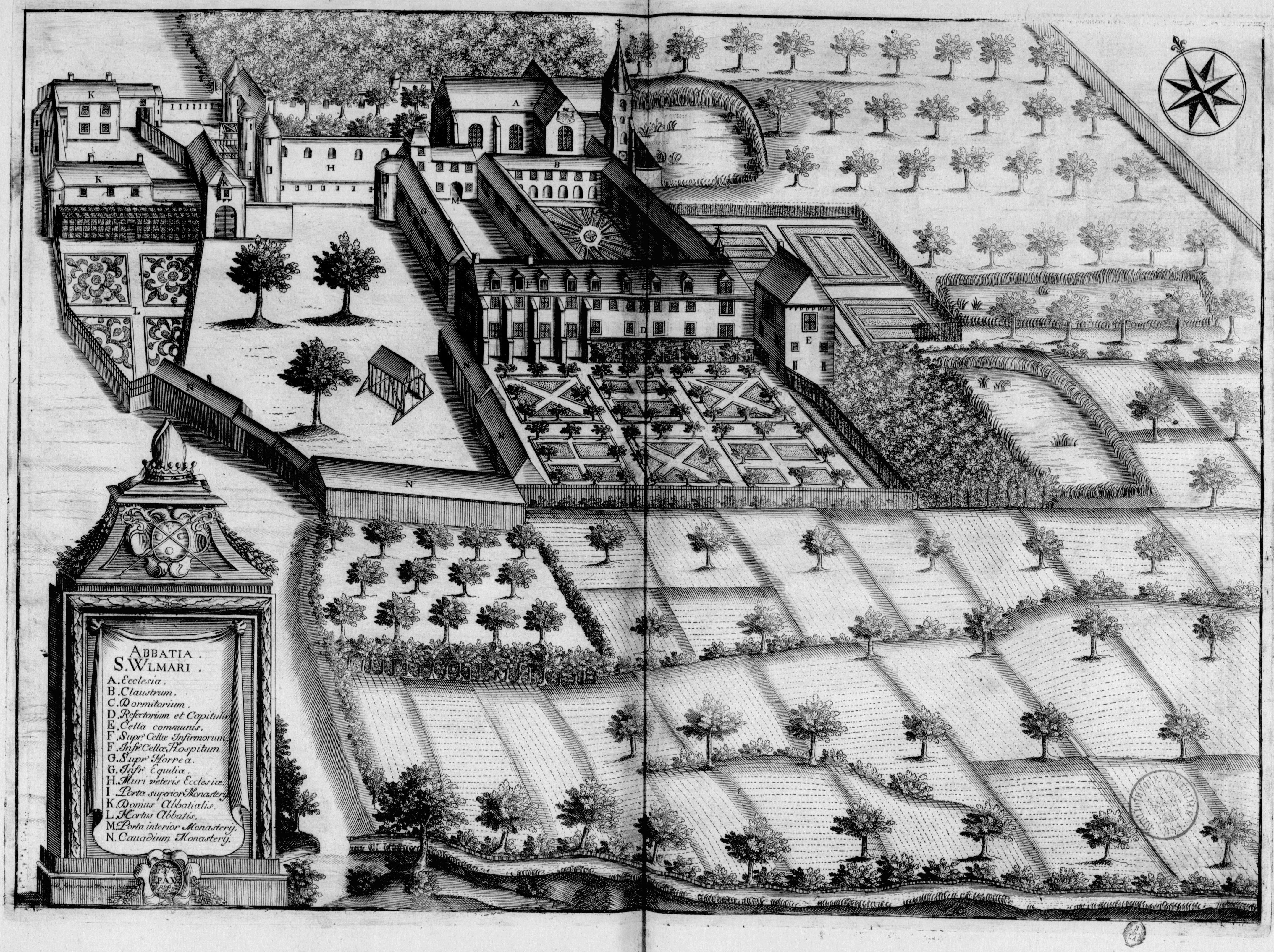 Planche gravée du 17ème siècle représentant l'abbaye Saint-Vulmer de Samer, dans le livre Monasticon Gallicanum.